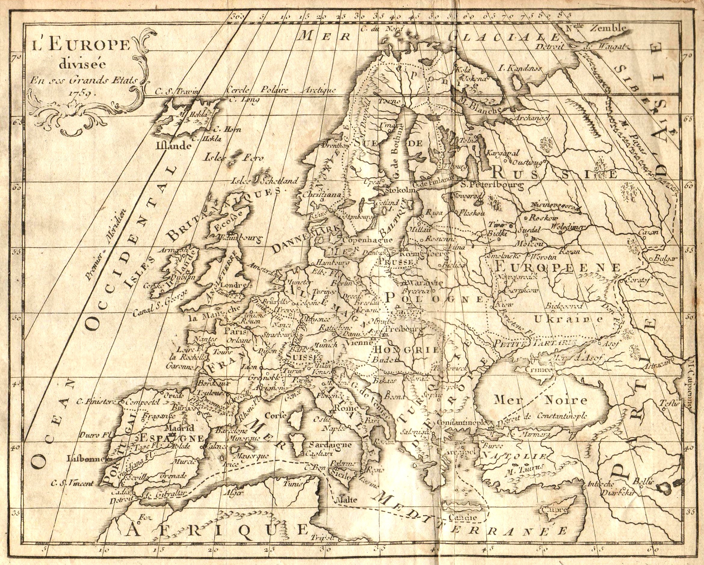 Carte d'europe dressée en 1763 avec le méridien origine à l'ile de fer (canaries)